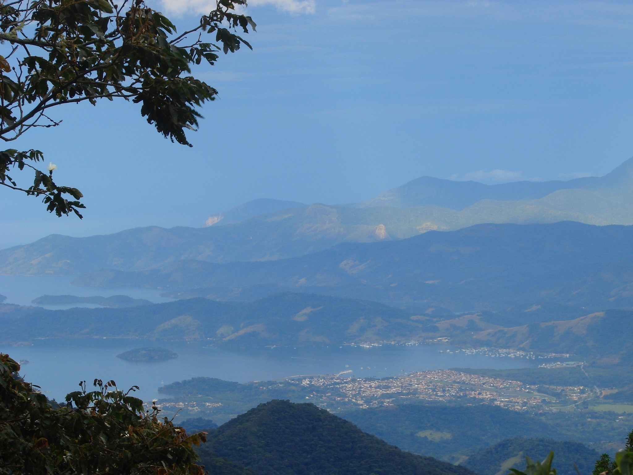 Vista parcial da baía de Parati-RJ-Brasil